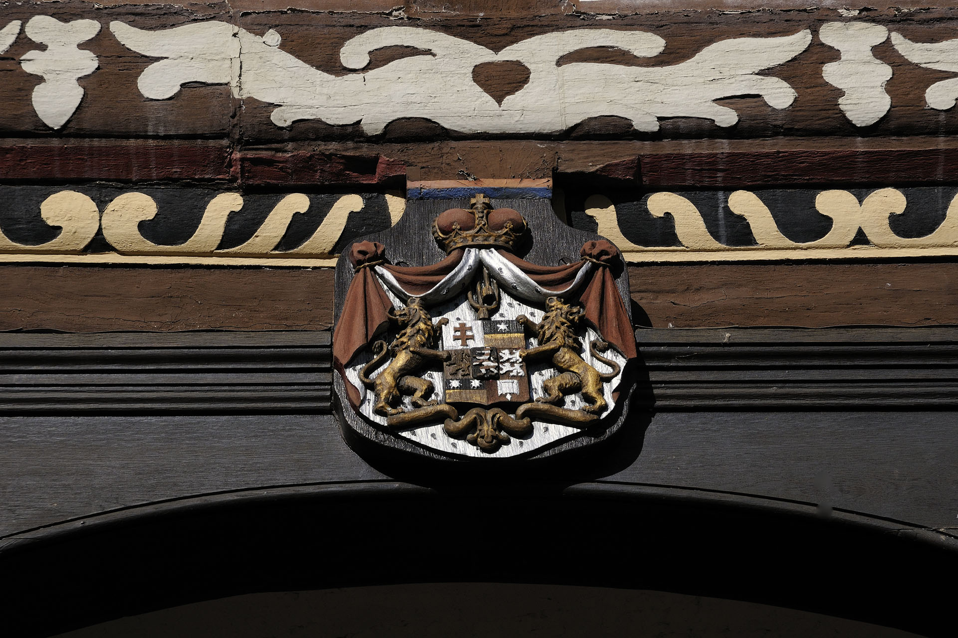 Rittergut Völkershausen Wappen am Torbogen neben der ev. Kirche - Blick aus Süd